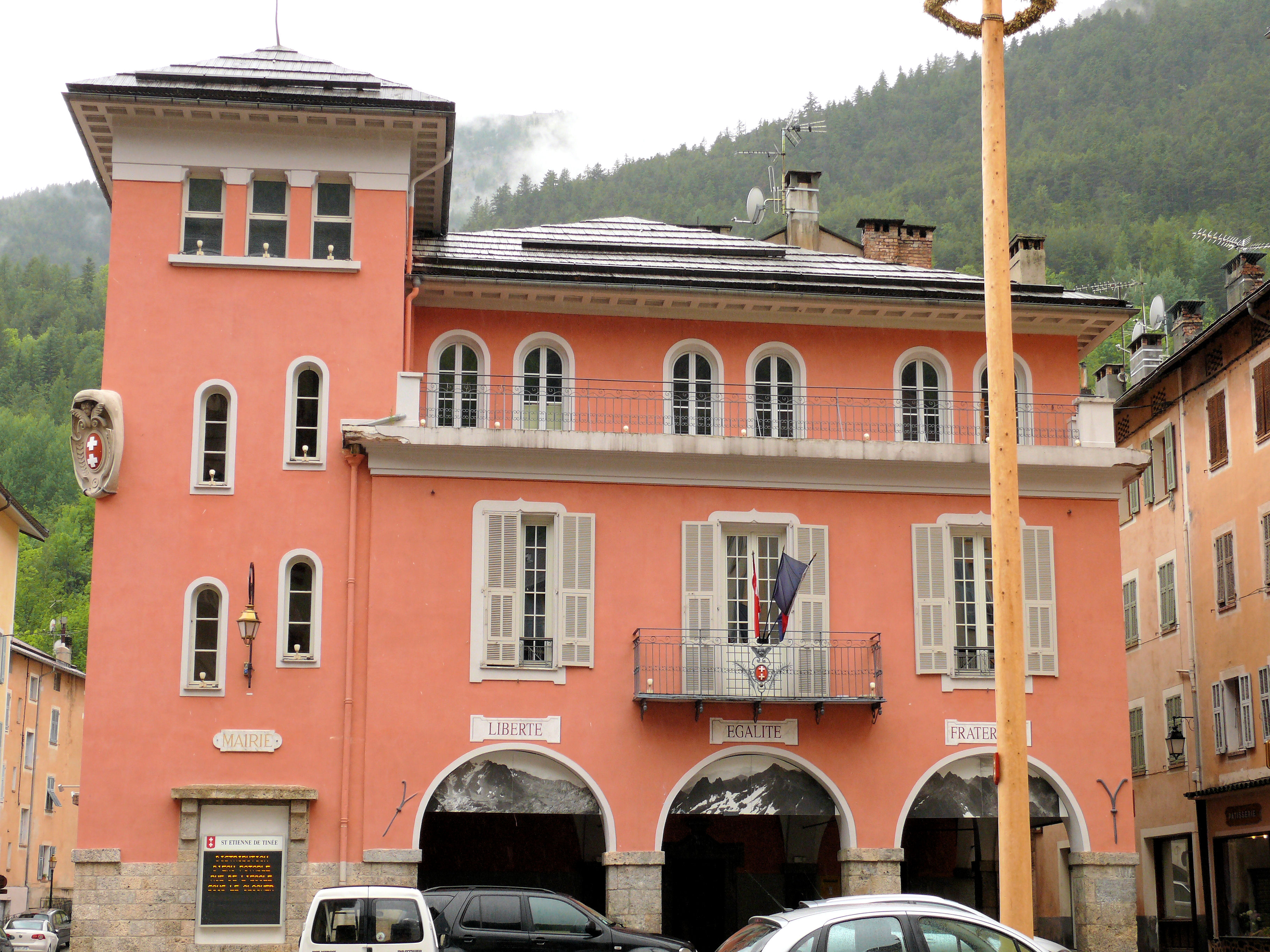 Saint-Étienne-de-Tinée - Mairie, place de l'Eglise